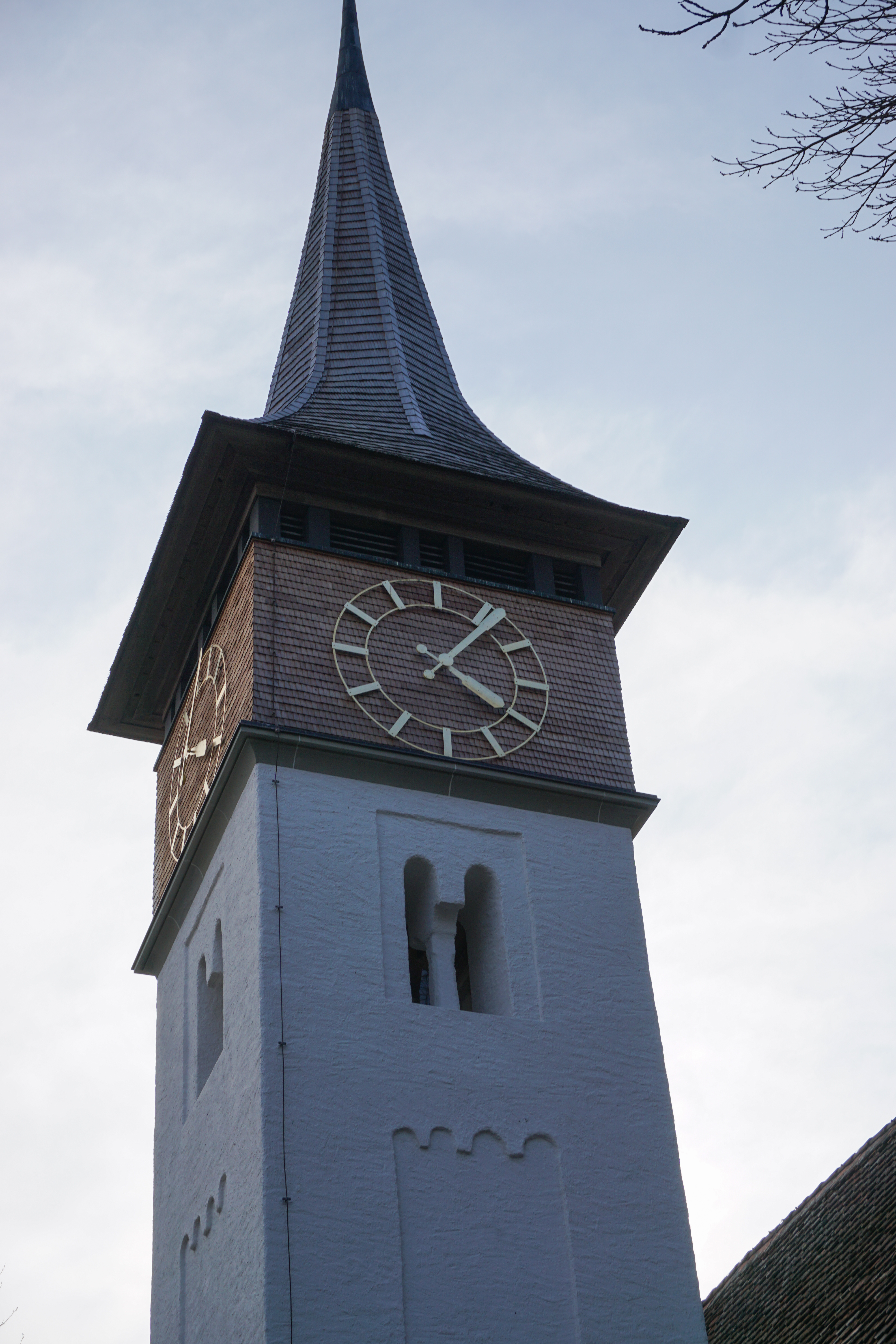 Turm mit Zifferblatt, Schallfenster und Blenarkaden